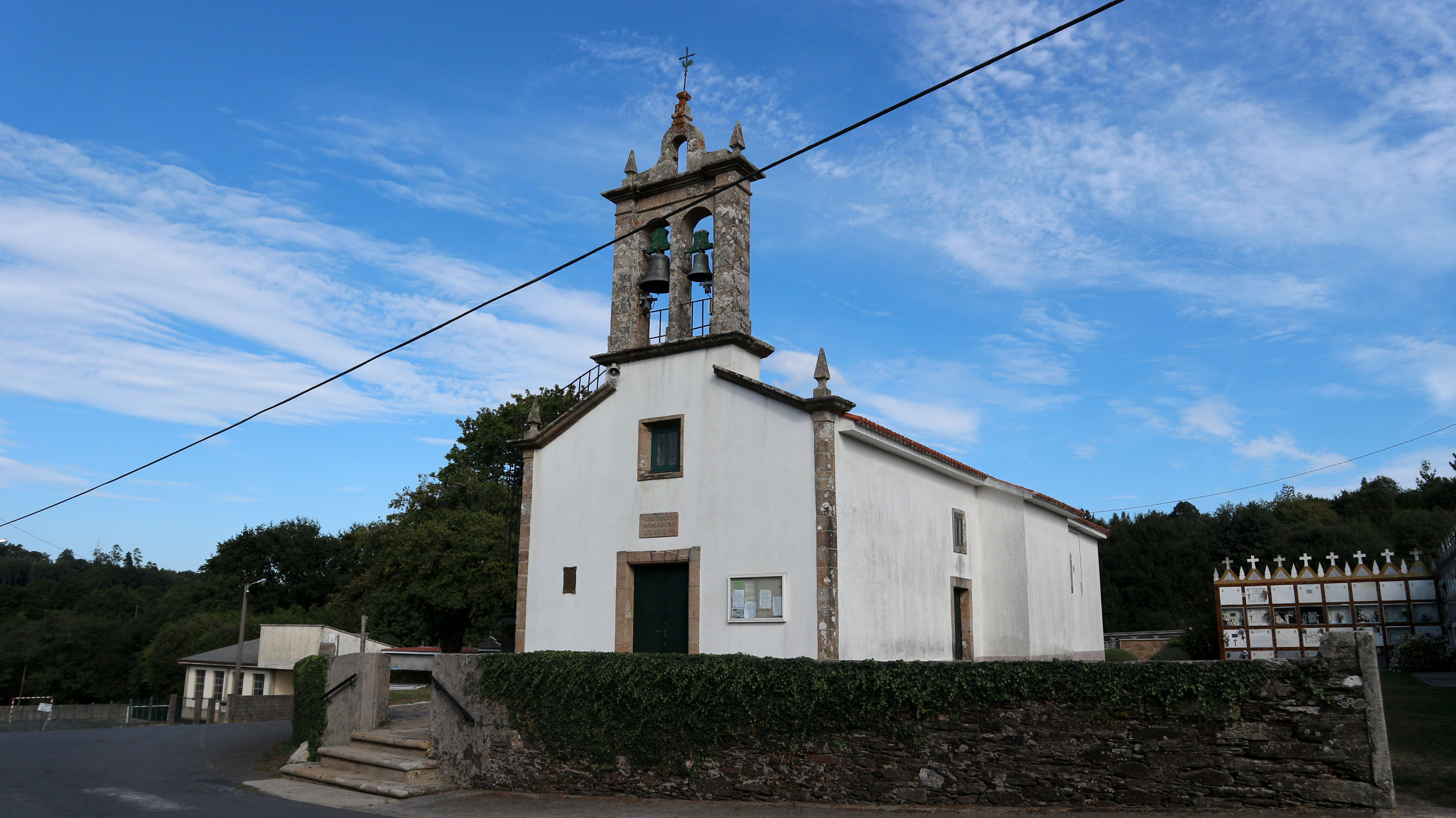 Igrexa de Santa María de Beán. Beán, Ordes.